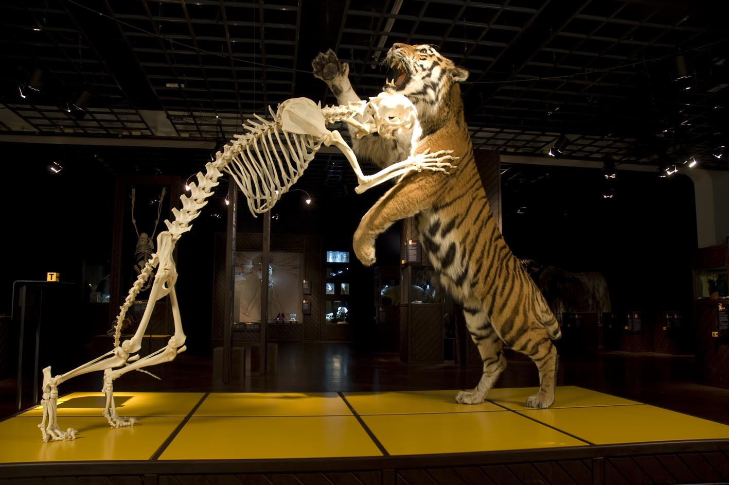 Tiger kæmper med tiger